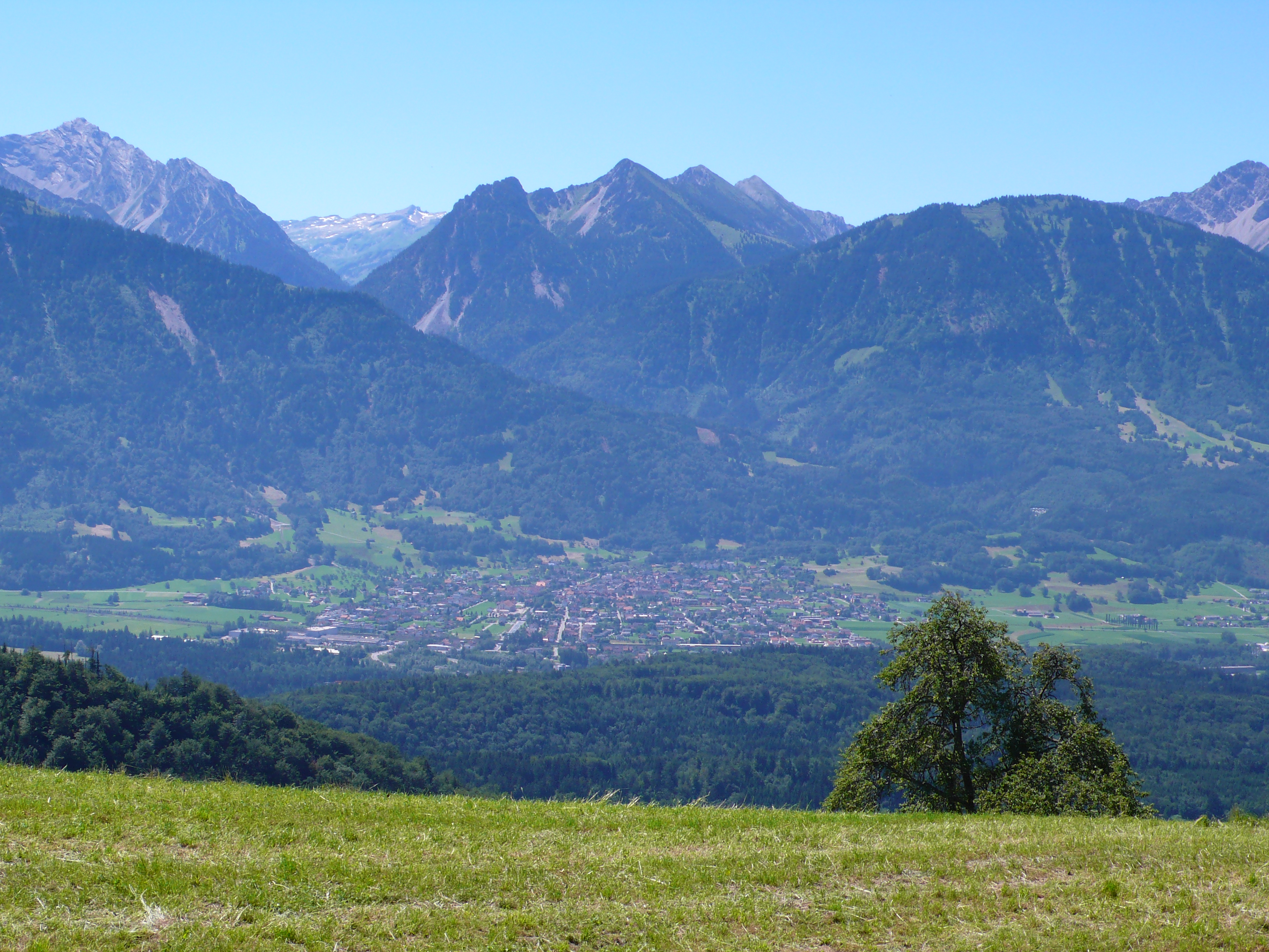 Nenzing, Vorarlberg